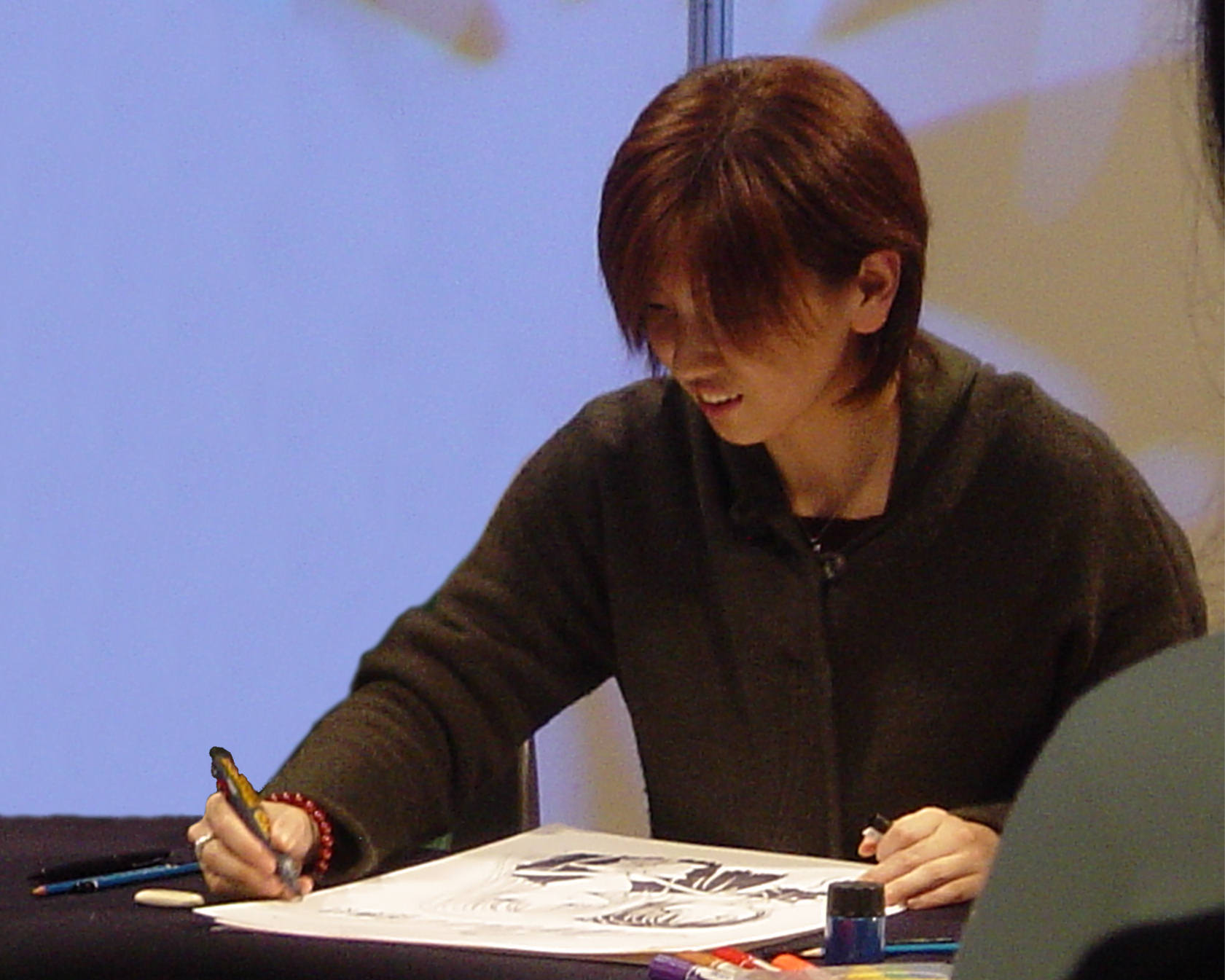 Mangaka Yuu Watase drawing a sample from Imadoki at Lucca Comics 2004 in Italy